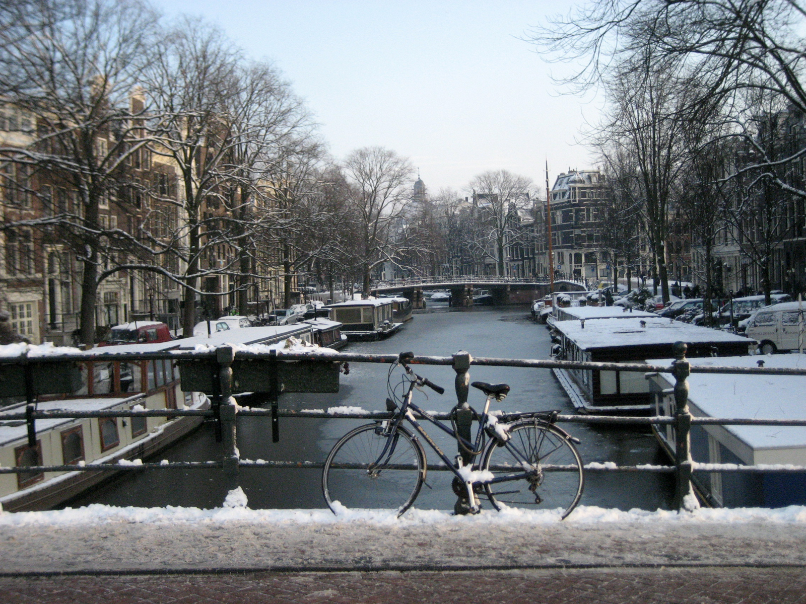 Brouwersgracht, Amsterdam